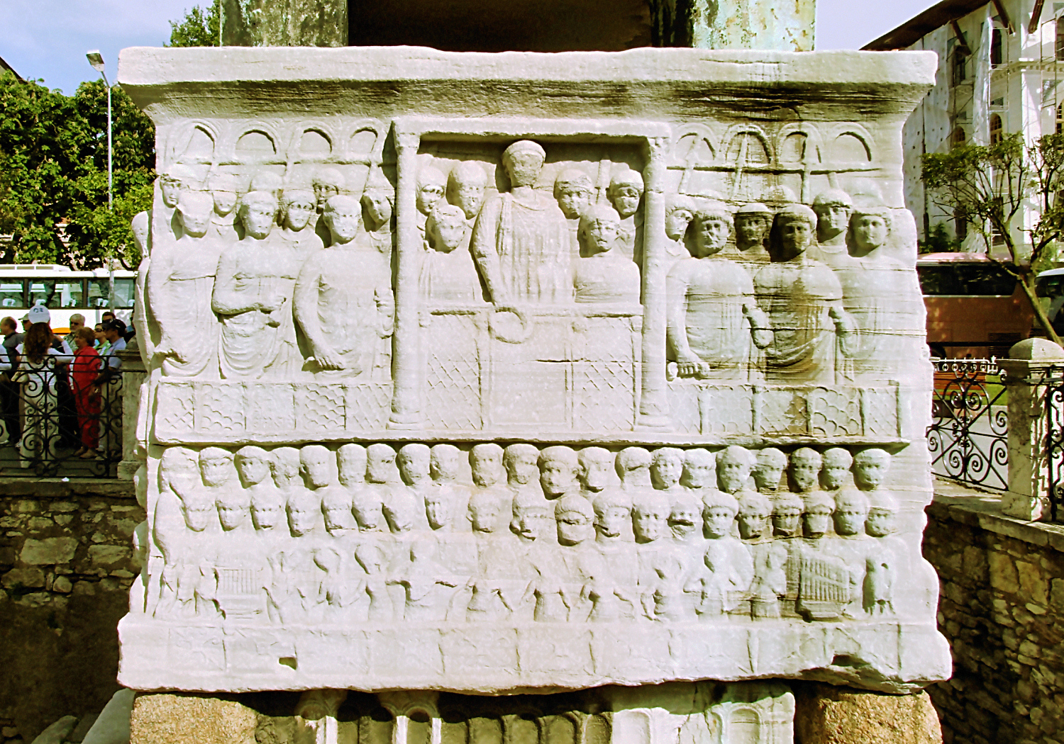 Stambuł, obelisk Teodozjusza na Hipodromie, piedestał; Istambul, Theodosius obelisk in the Hippodrome, pedestal